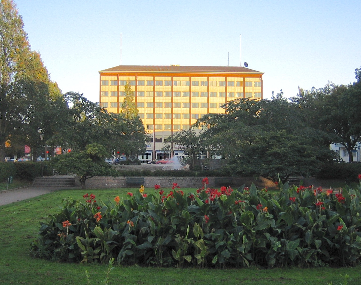 Nobeltorget, Malmö, Sweden